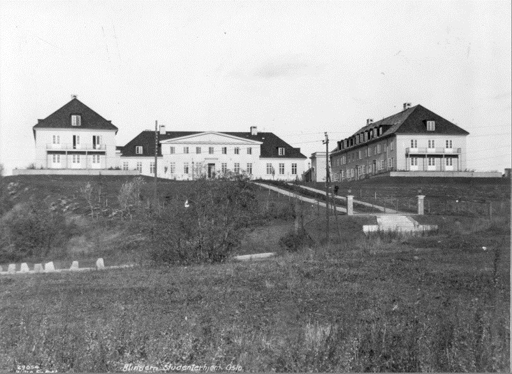 Blindern studenthjem sett fra Blindernveien